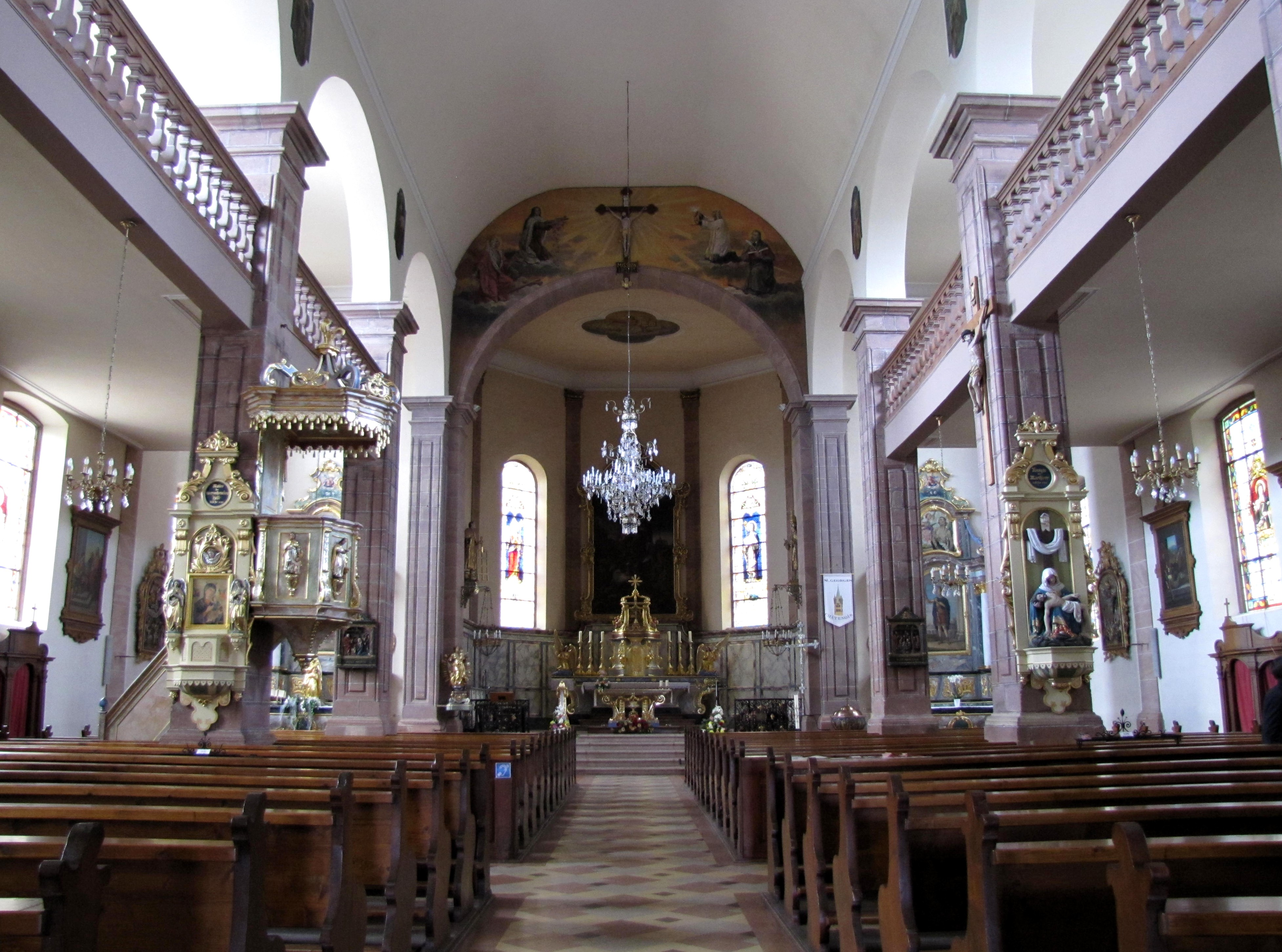 Alsace, Bas-Rhin, Église Saint-Georges de Châtenois (PA00084665, IA00124434).Vue de la nef vers le chœur.